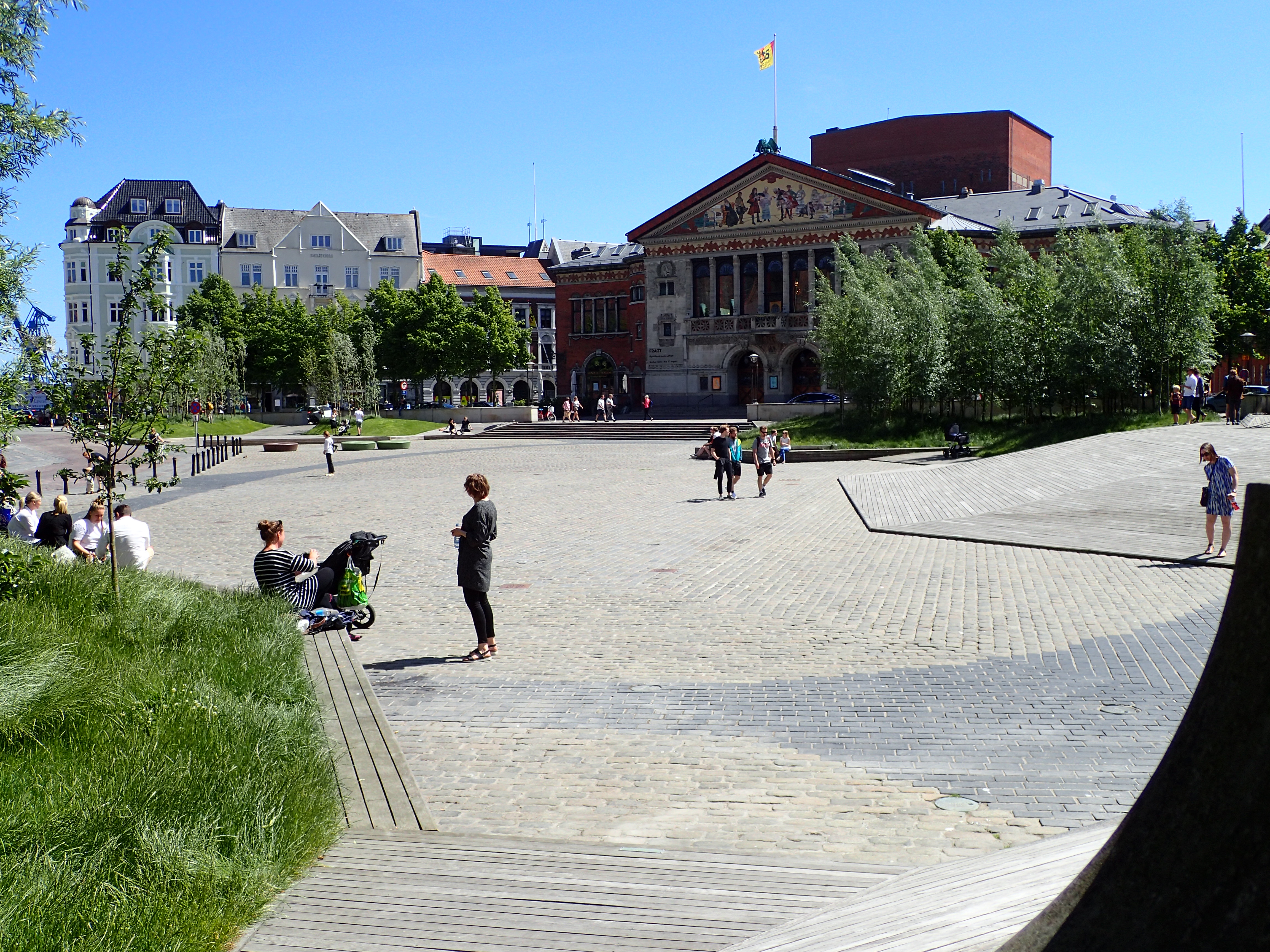 Bispetorv i Aarhus.